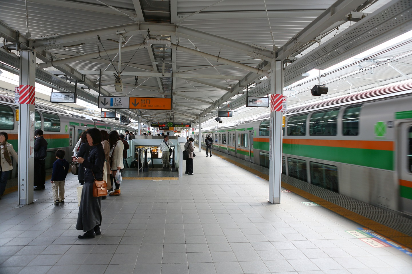 浦和駅3/4番線